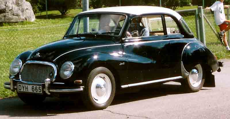 DKW S-Coupé 1957